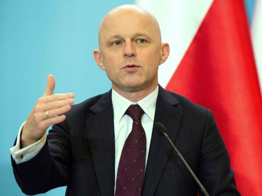 Paweł Szałamacha, minister finansów w rządzie Beaty Szydło.